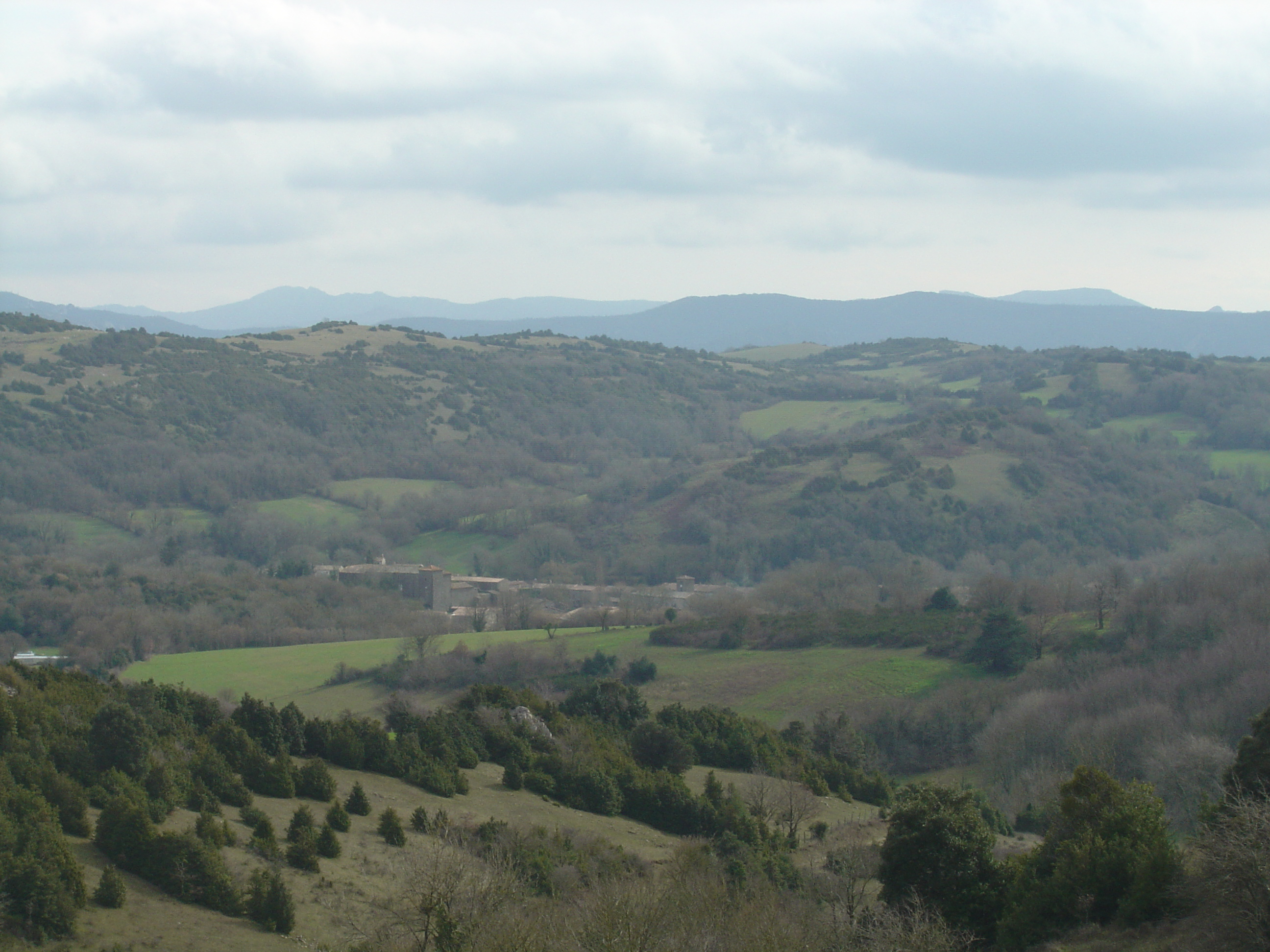 Village de Bouisse vu depuis le chemin d'accès au Milobre de Bouisse